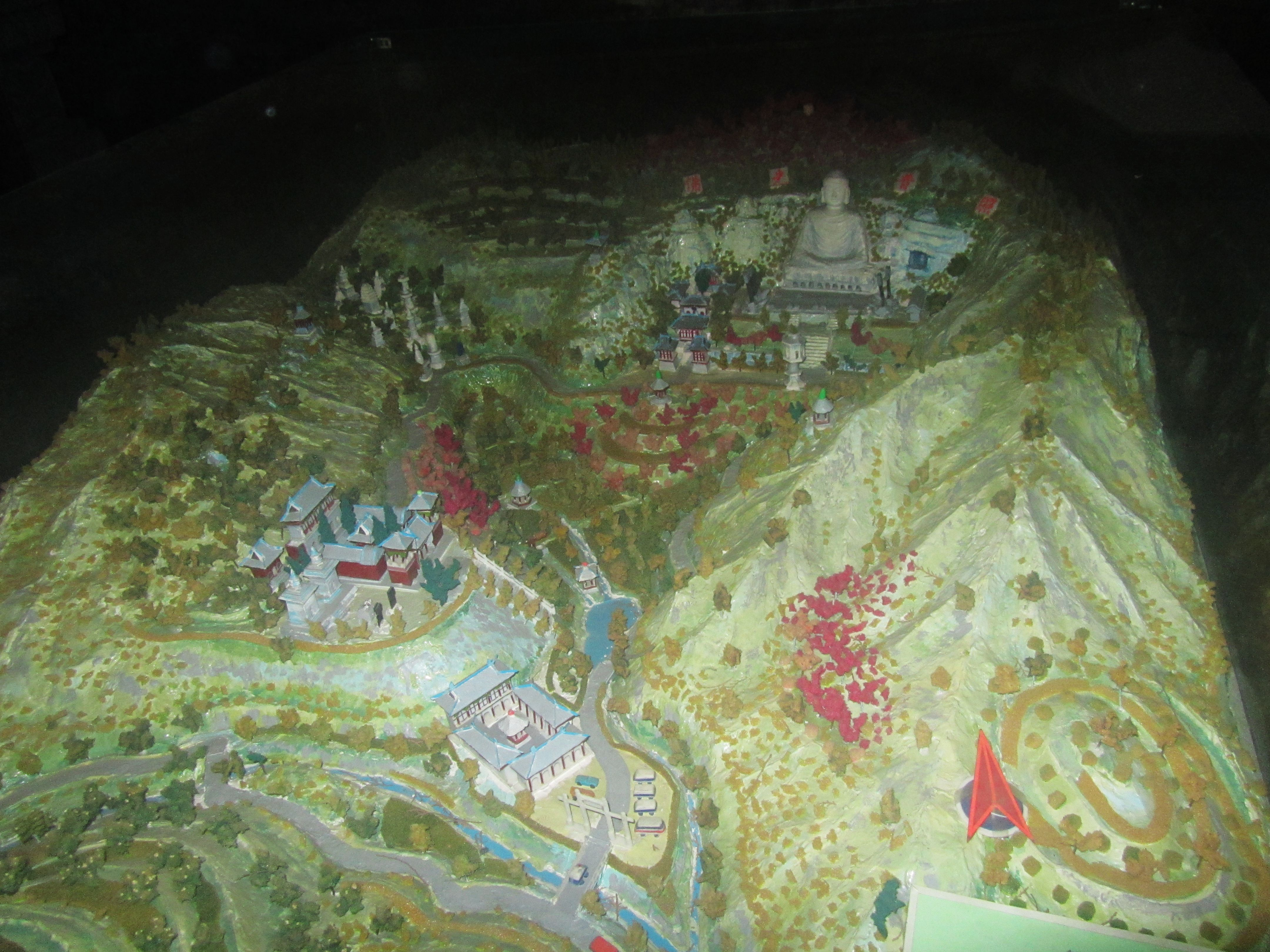 晋源文庙大成殿内所陈列的一组建筑模型，很有可能是蒙山大佛景区，不太确定。